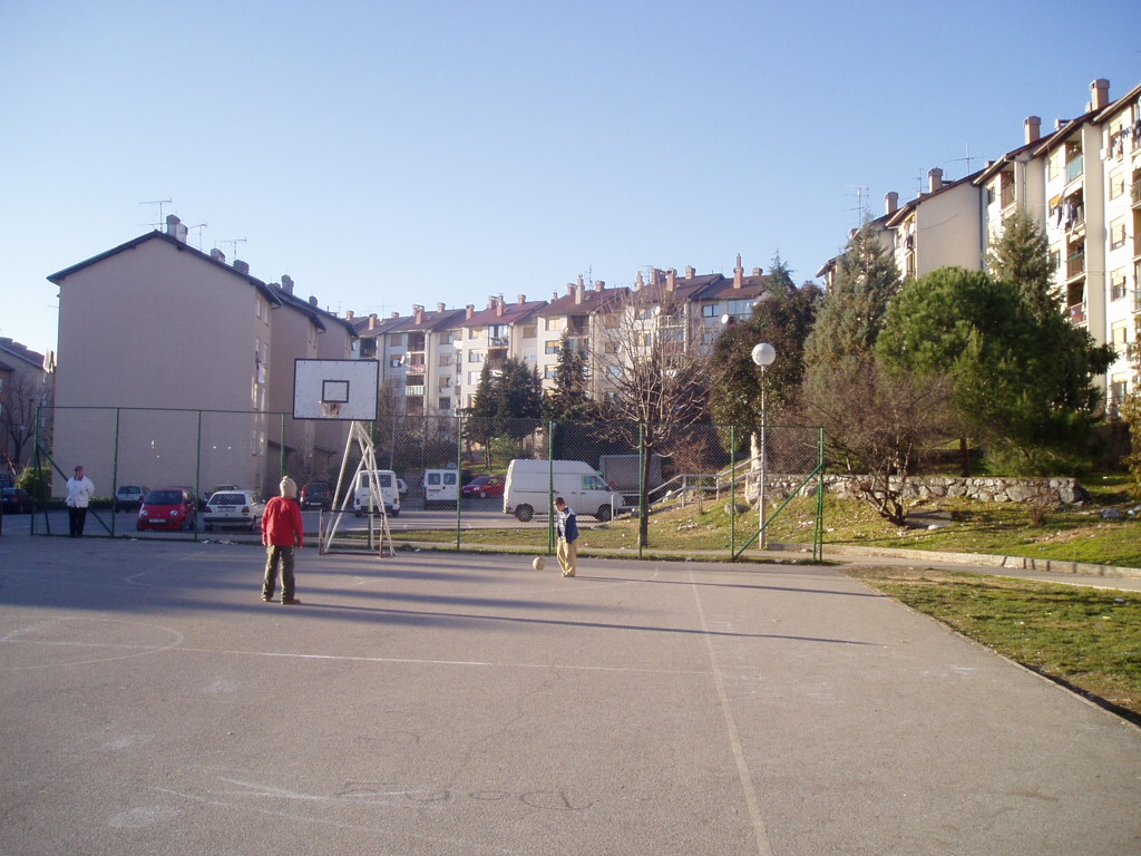 Blečići-Srdoči, igralište